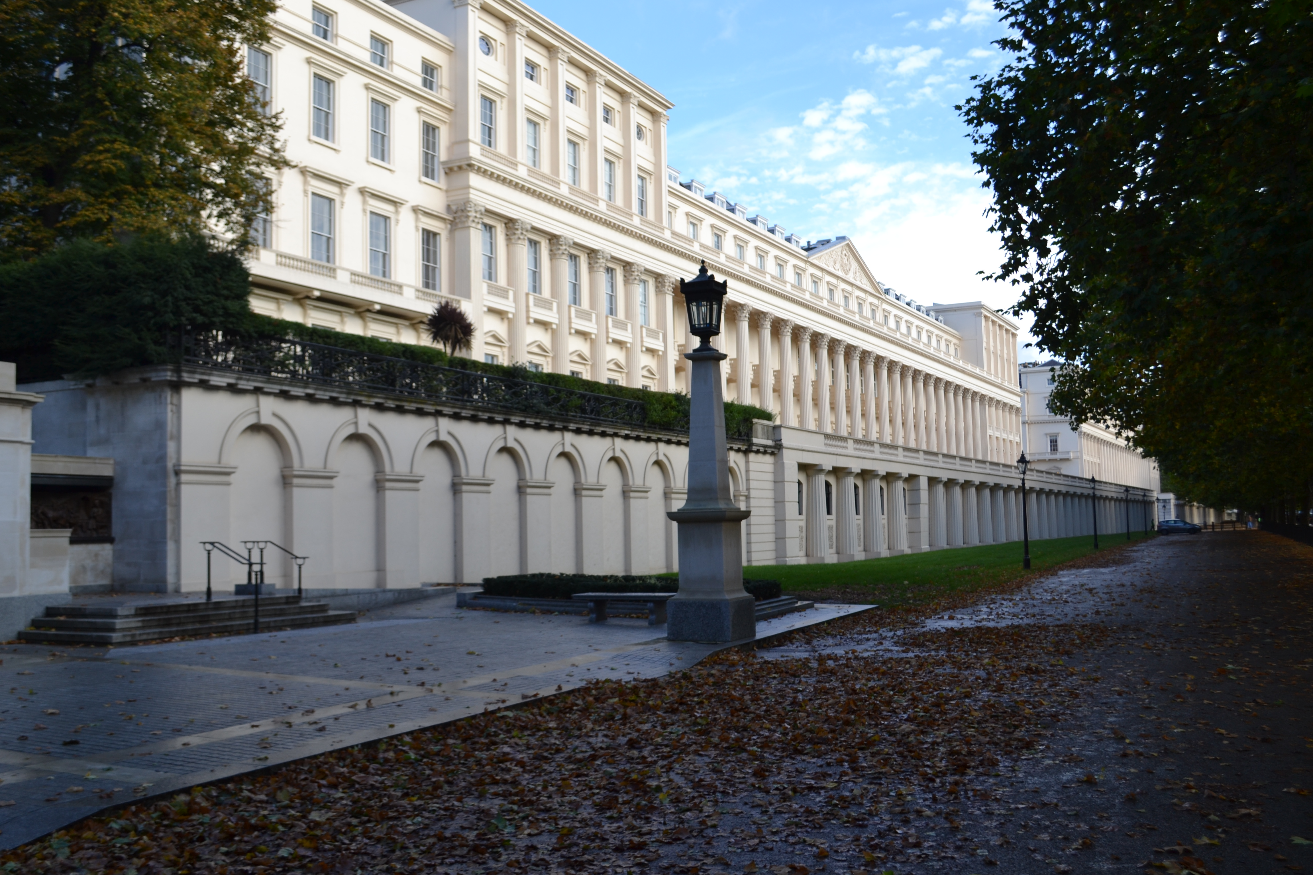 Carlton House Terrace, Londres.